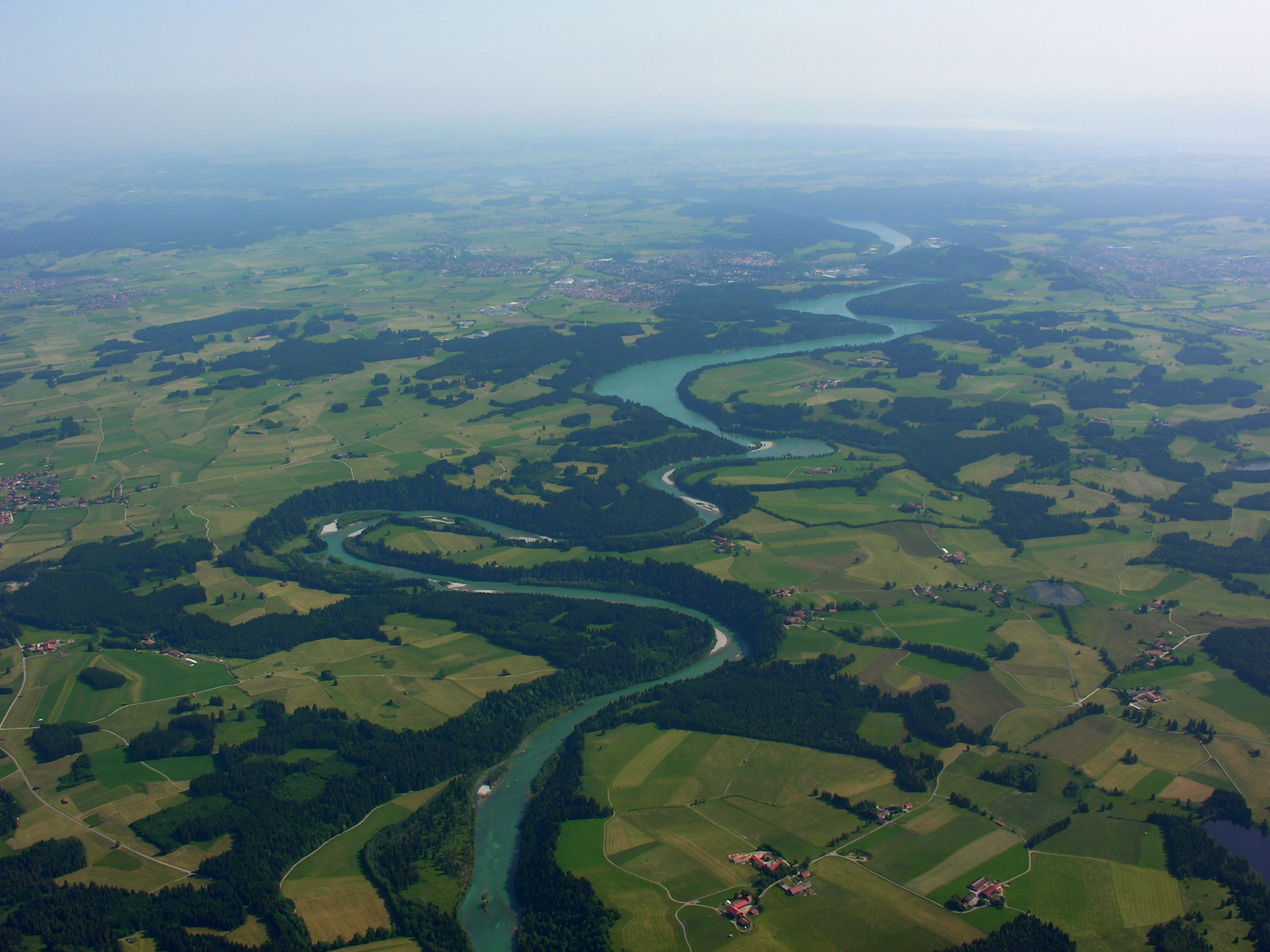 Germany, Bavaria, Lech near Burggen, Litzauer Schleife